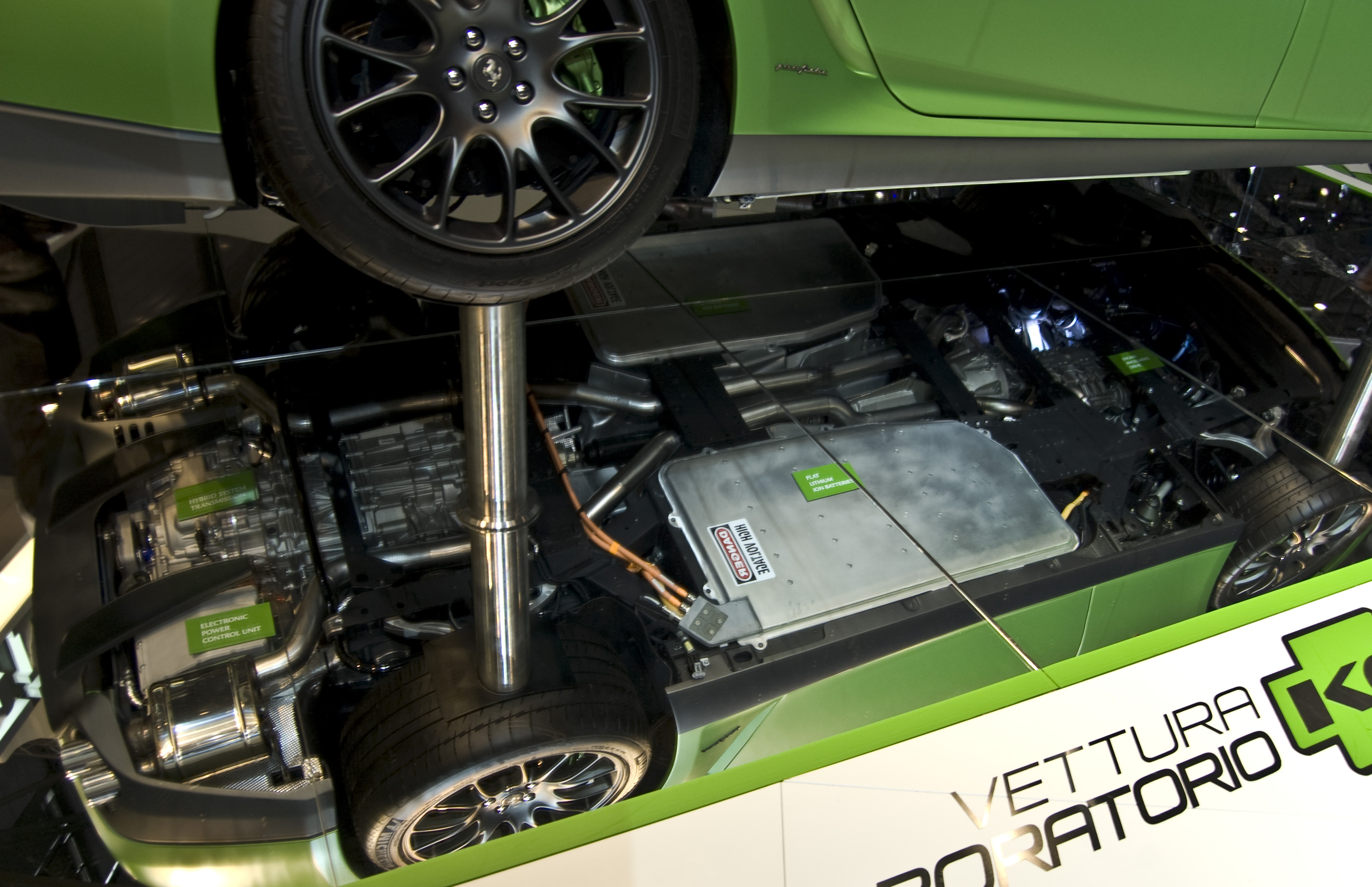 Ferrari 599 HY KERS en el Salón de Ginebra 2010.